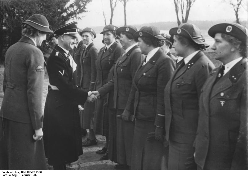 Gross-Schulzendorf, Reichsführerschule des DRK Von der Eröffnung der Reichsführerschule des Deutschen Roten Kreuzes. Das Deutsche Rote Kreuz, das bereits 9 Landesführerschulen unterhält, hat nun auch eine Reichsführerschule errichtet, die in Gross-Schulzendorf nahe der Reichshauptstadt liegt und am Montagvormittag durch den Geschäftsführenden Präsidenten des Deutschen Roten Kreuzes, SS-Brigadeführer Dr. Grawitz, feierlich eröffnet wurde. Hier begrüßt Dr. Grawitz Teilnehmerinnen am ersten Lehrgang der Reichsführerschule. Bei Abdruck nennen: Scherl Bilderdienst, Berlin 20.2.39 [Herausgabedatum] Abgebildete Personen: Grawitz, Ernst-Robert Prof. Dr. med.: SS-Gruppenführer, Reichsarzt, Präsident des DRK, Deutschland